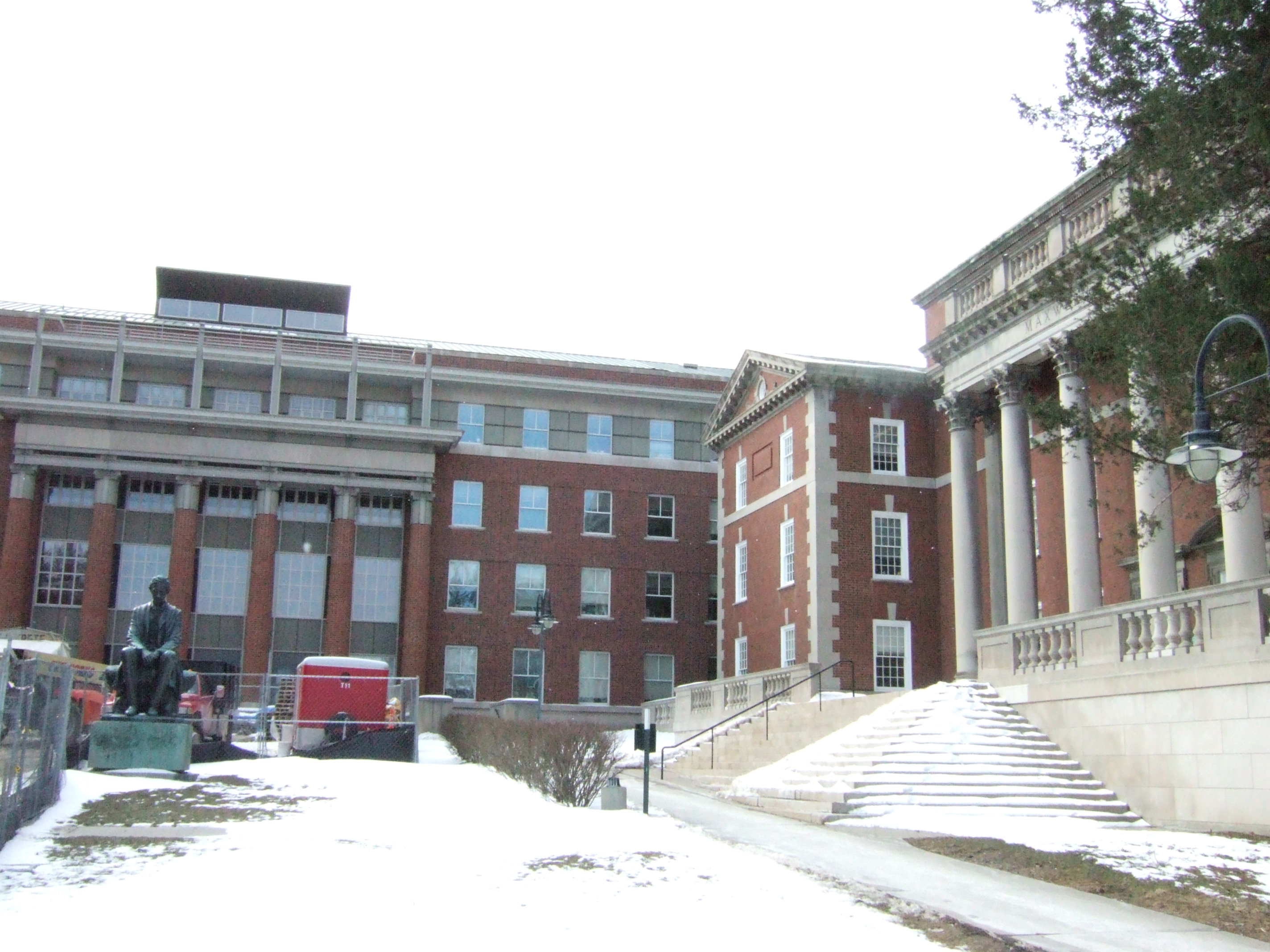 03/07/06 taken by Kisstory